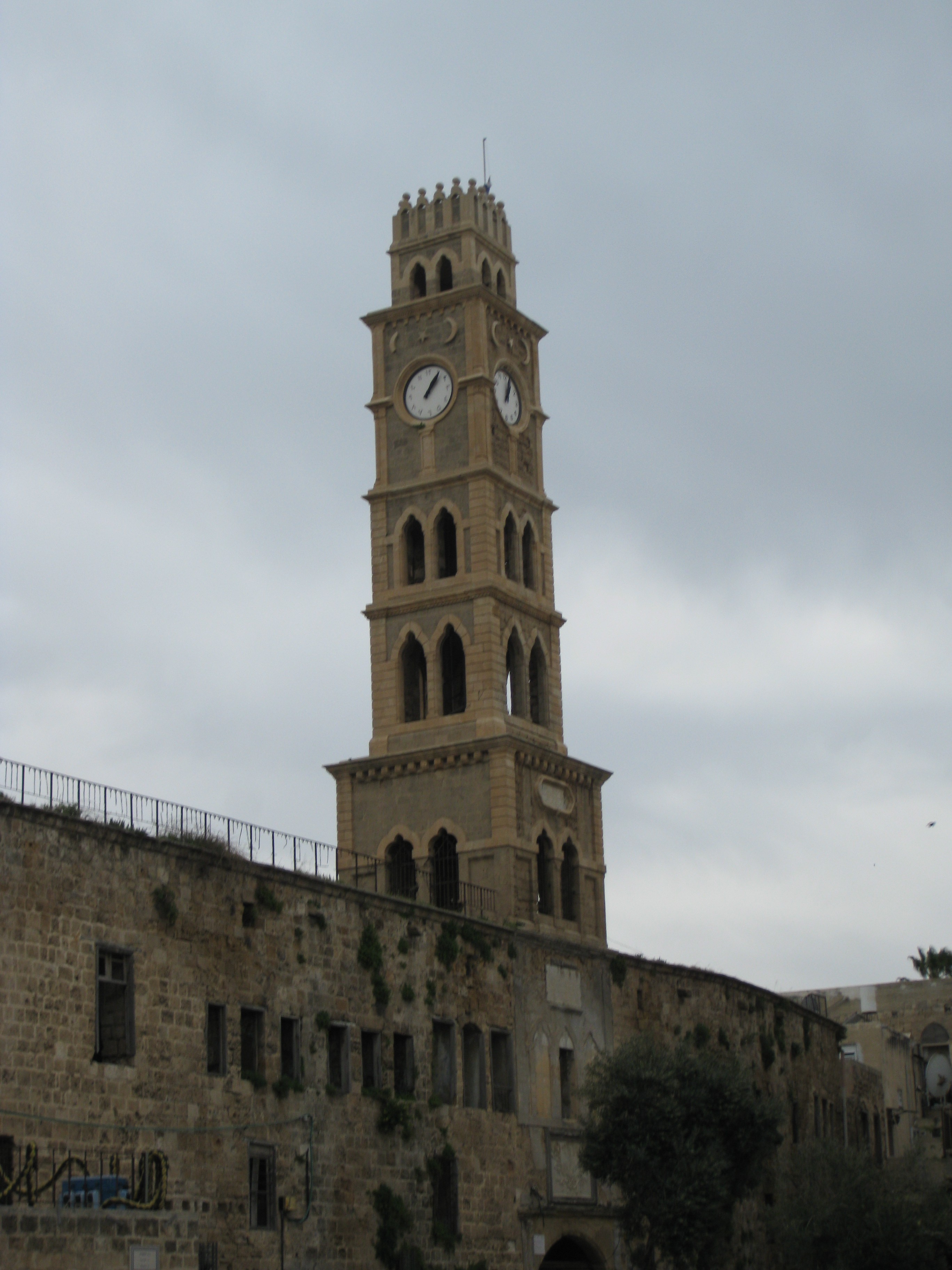 Acco (Acre, Akko) - Khan al-Umdan עכו - חאן אל עומדאן